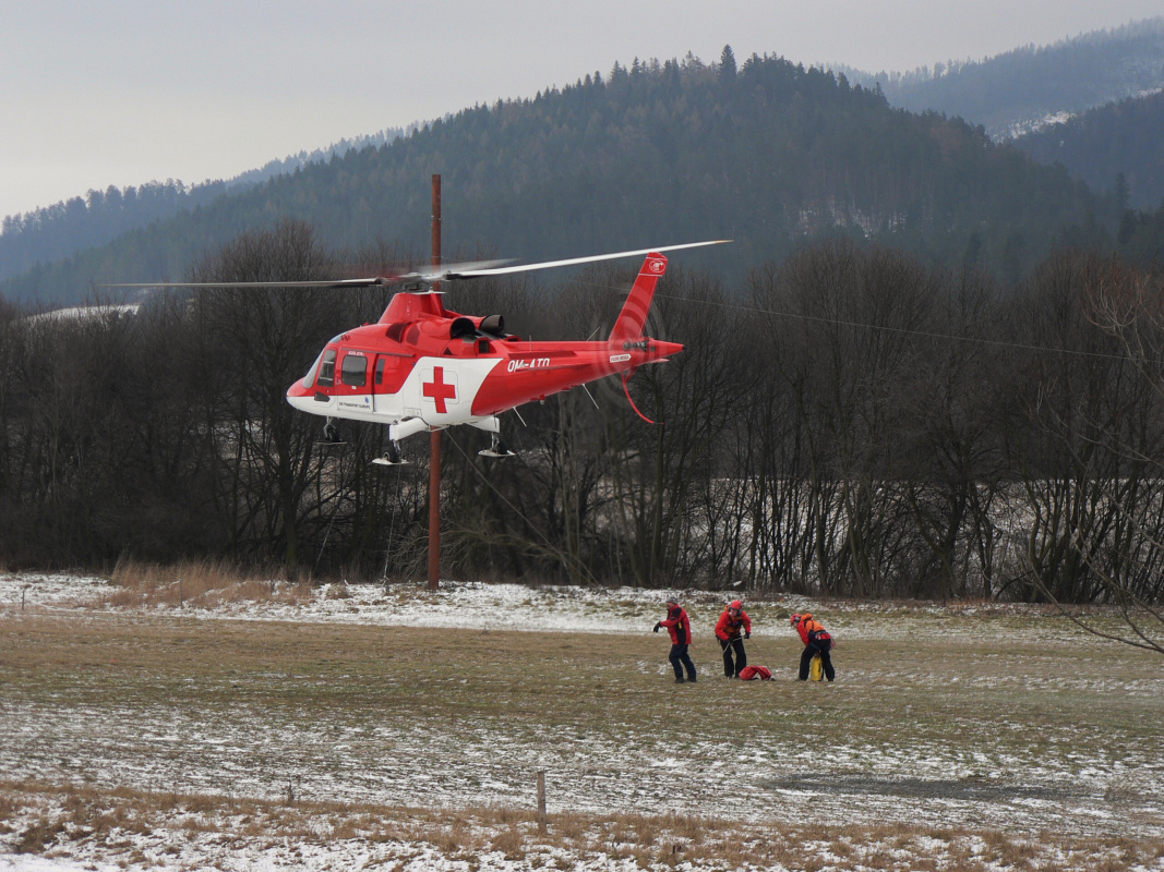 Záchranná akcia v Slovenskom raji - Slovakia